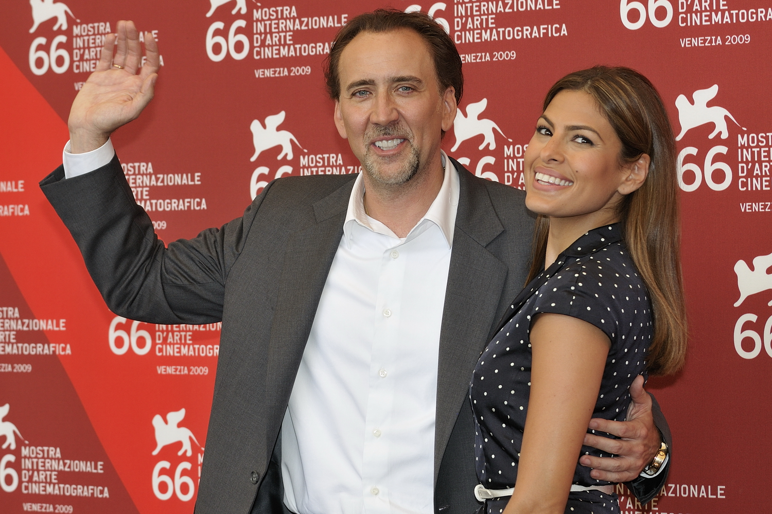 66ème Festival du Cinéma de Venise (Mostra), 3ème jour (04/09/2009) Photocall avec Nicolas Cage, Eva Mendes et le réalisateur Werner Herzog pour le film : Bad Lieutenant : Port of Call New Orleans